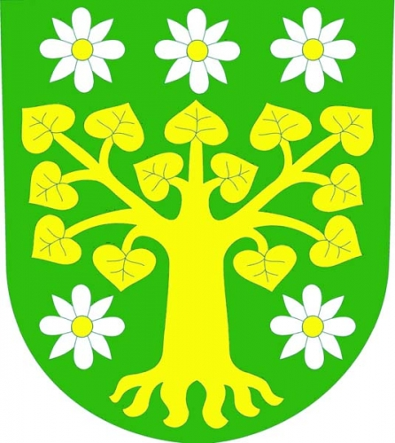 znak, Dobré, okres Rychnov nad Kněžnou